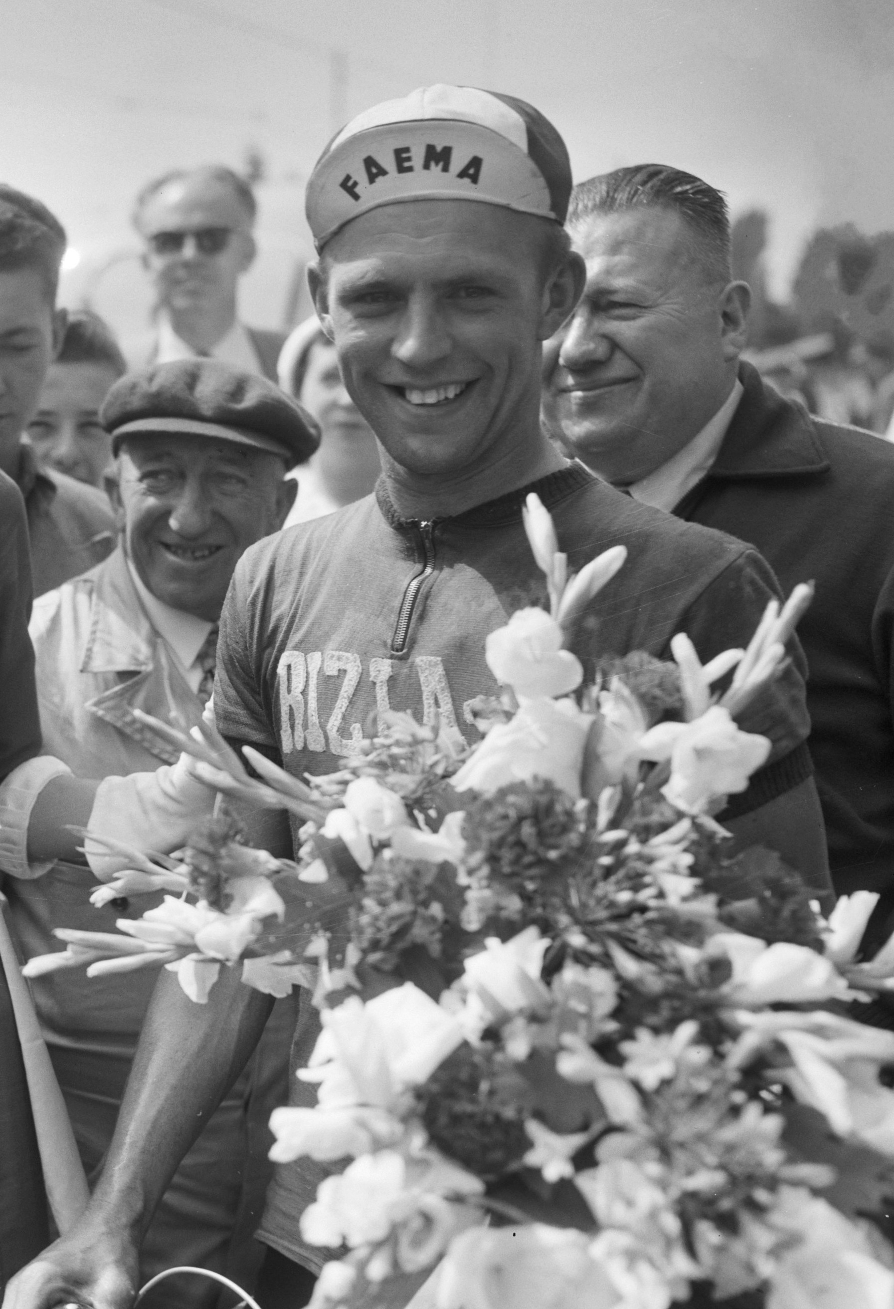 Ronde van Nederland. Finish 4e etappe Rotterdam. Miss Remington met ritwinnaar Noël Foré (België)